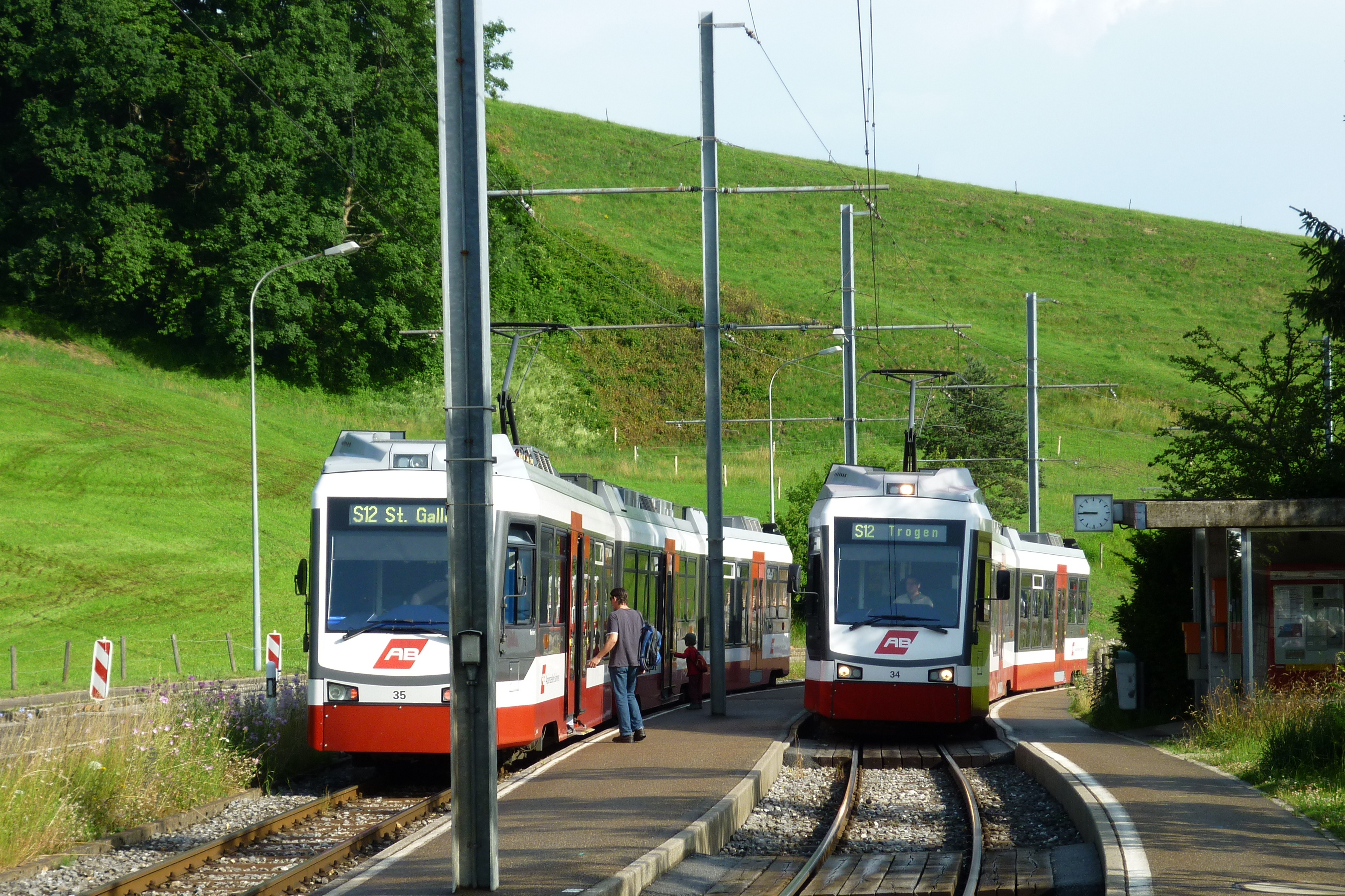 Trogenerbahn der Appenzeller Bahnen zwischen St Gallen und Trogen (Schweiz). Zugkreuzung an der Haltestelle "Schwarzer Bären".